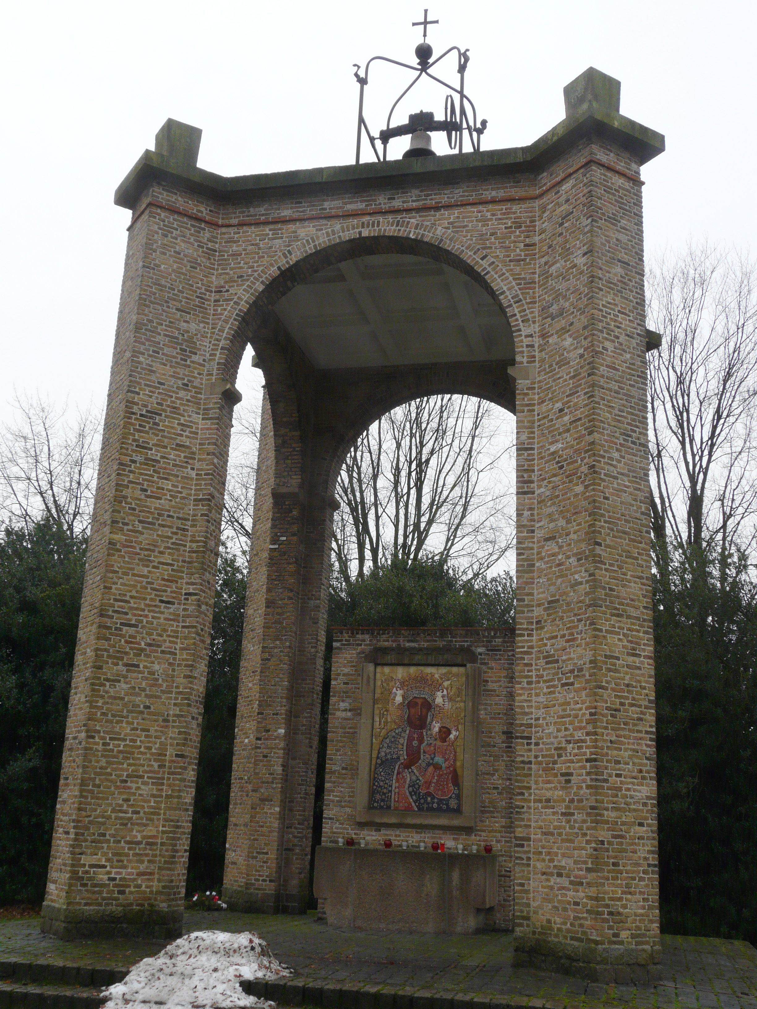 Zicht op een deel van de Mariakapel ook wel de Poolse Kapel genoemd, gelegen in een plantsoen op de hoek van de Wilhelminasingel en de Lovensdijkstraat. Niet ver van de grote doorgaande weg de Claudius Prinsenlaan, Breda